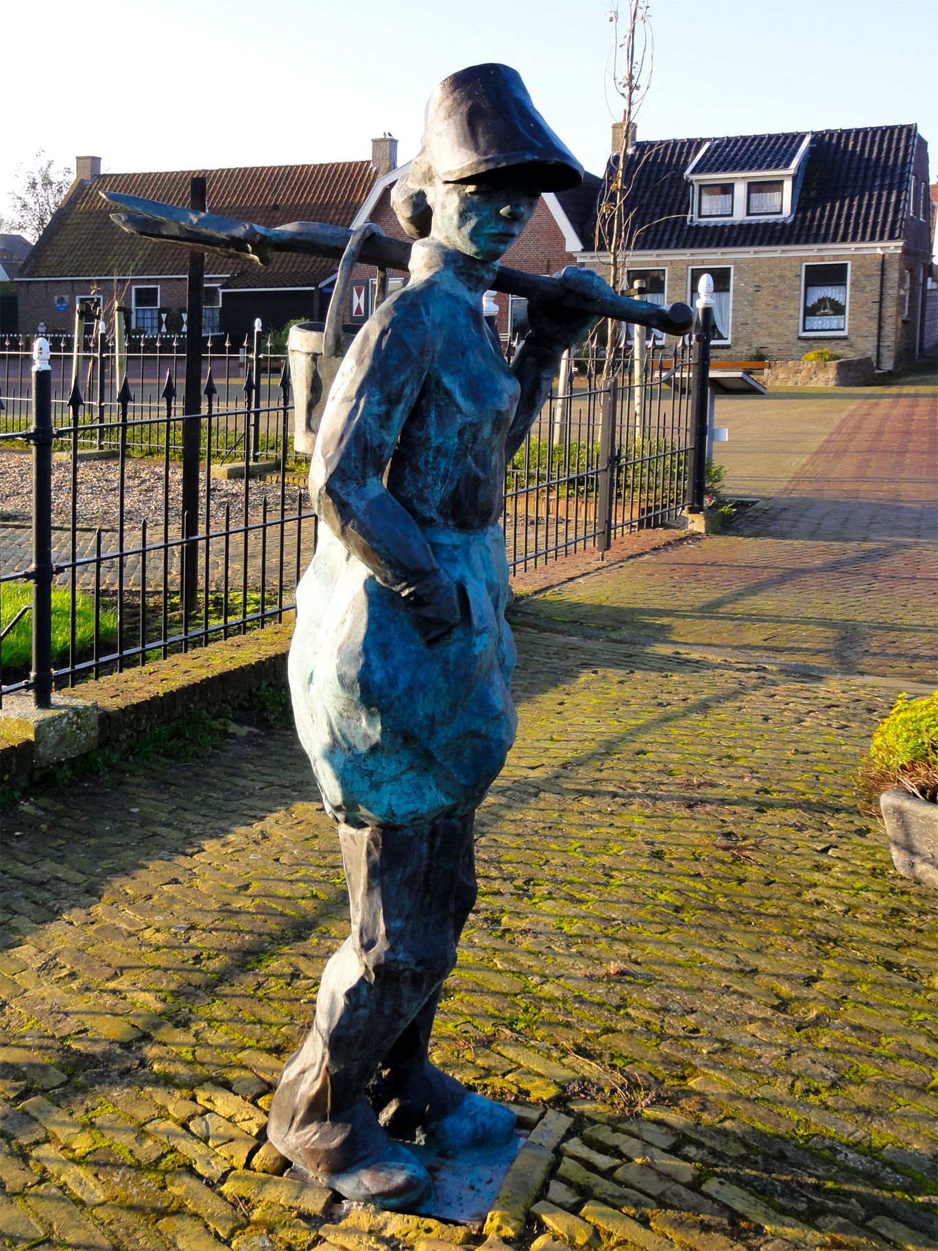 Wjirmdolster (pierensteekster) in Wierum door Hans Jouta